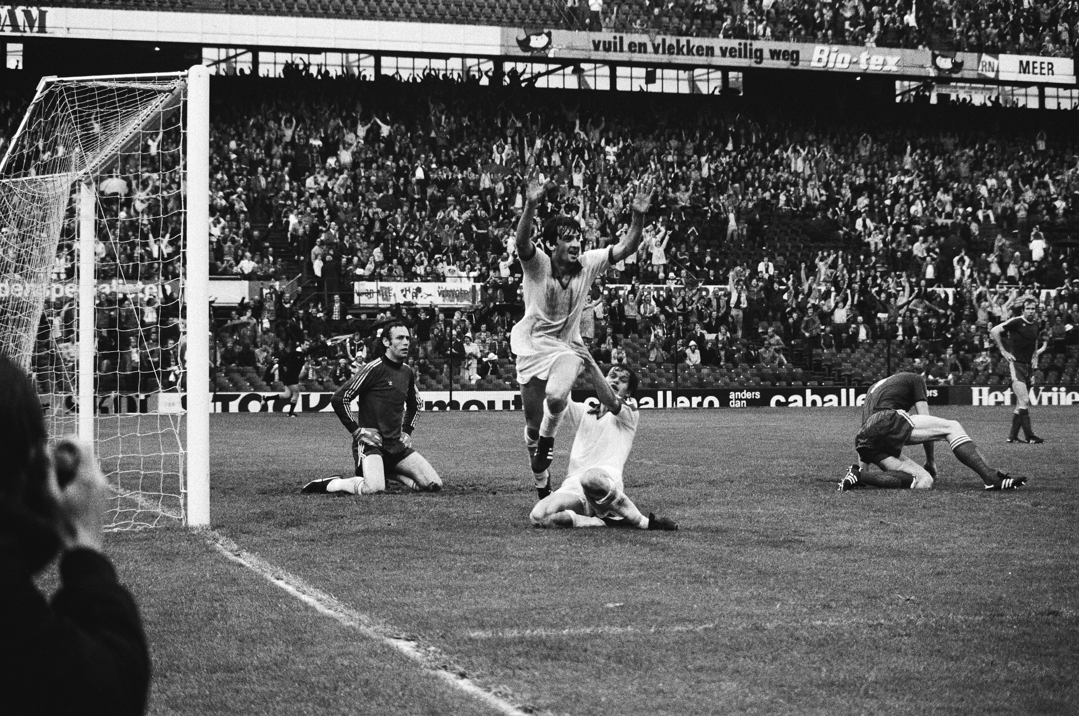 Finale de la coupe KNVB de football, Ajax - FC Twente (3-0) à Rotterdam. Ray Clarke exulte après le premier but. Photographie par Koen Suyk / Anefo.